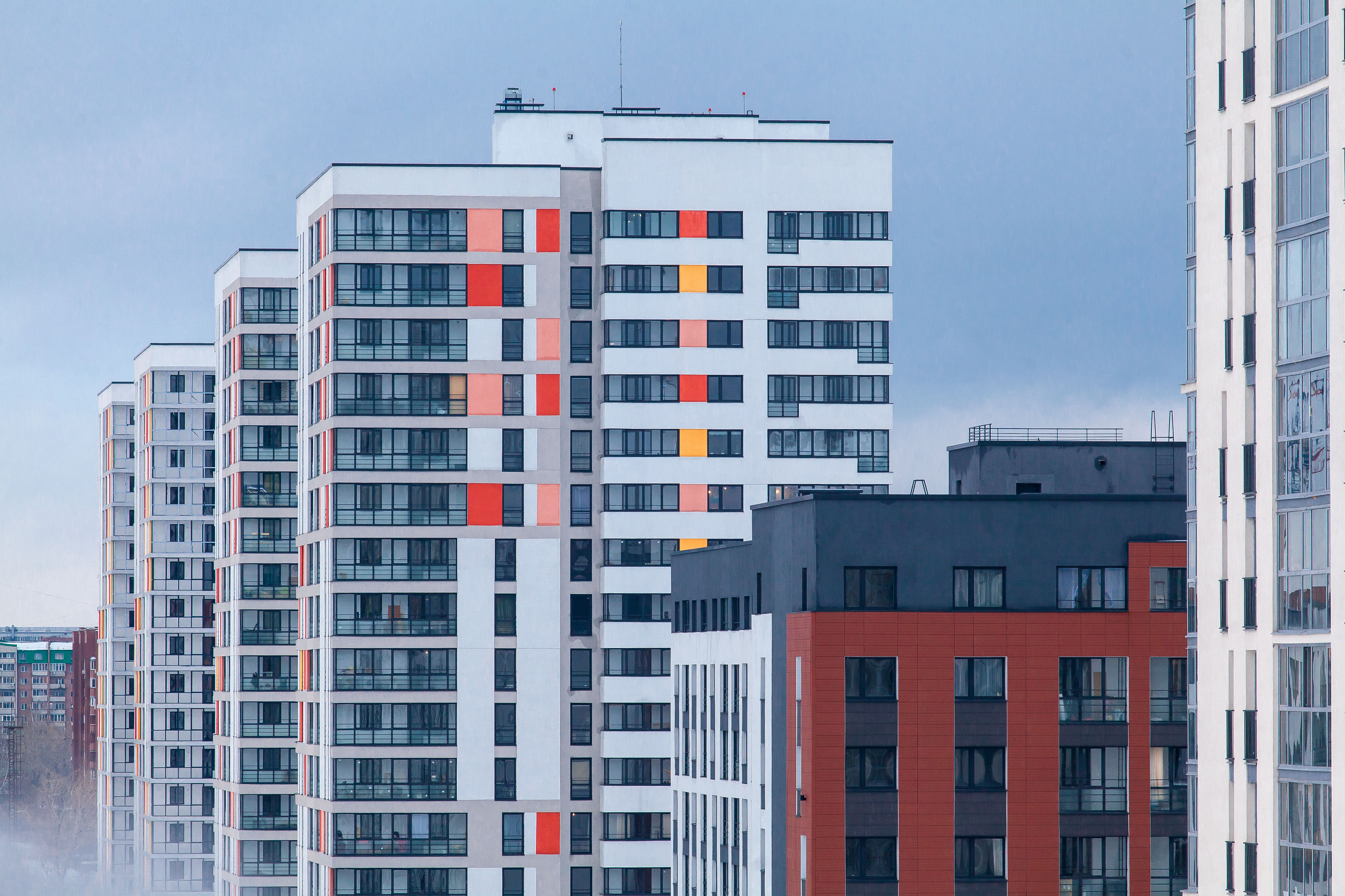 Жилой комплекс «Европейский берег» в Новосибирске